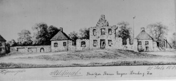 Andja mõis